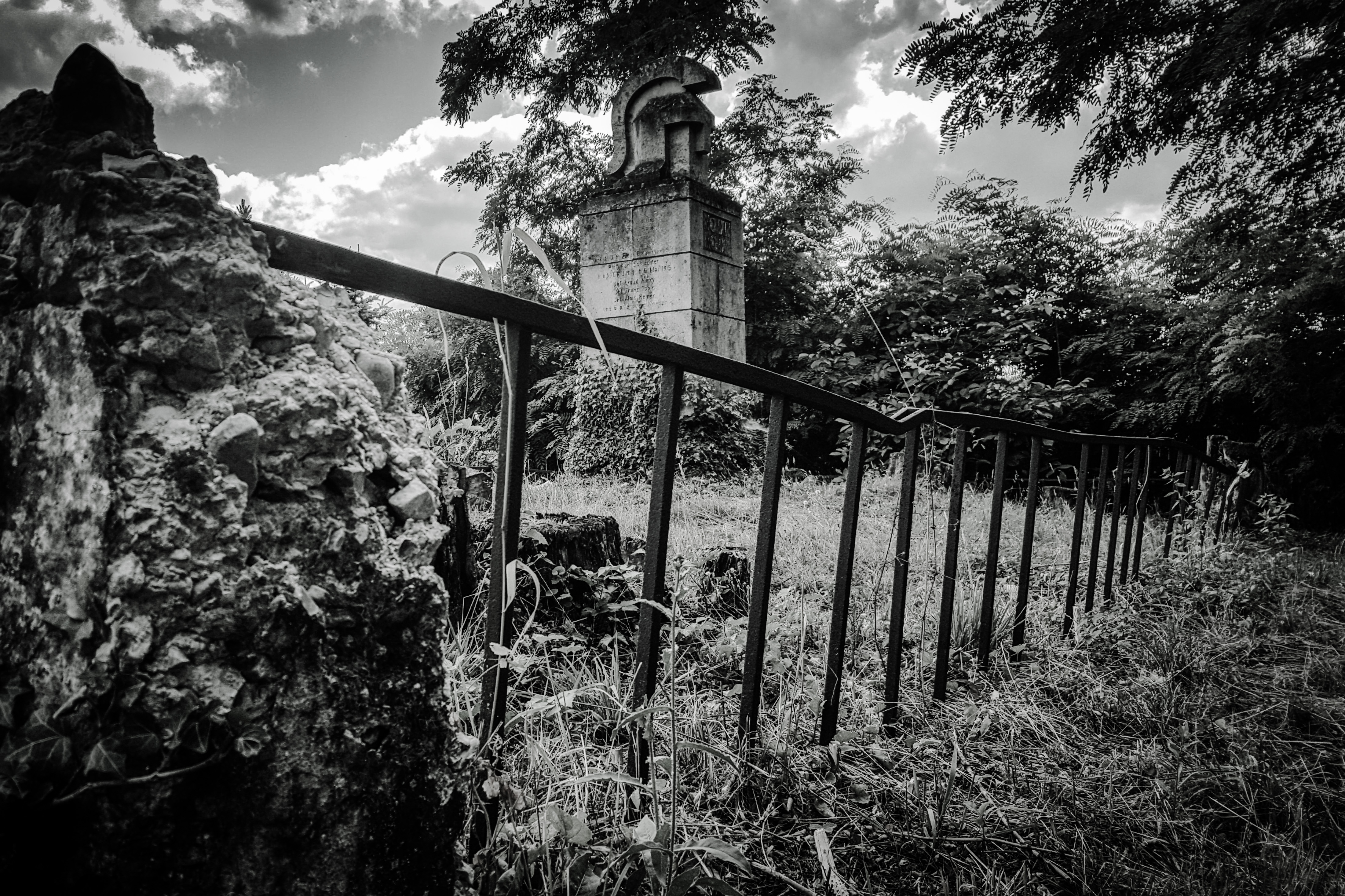 Szczepanowice. Cmentarz wojenny nr 197 z okresu I wojny światowej